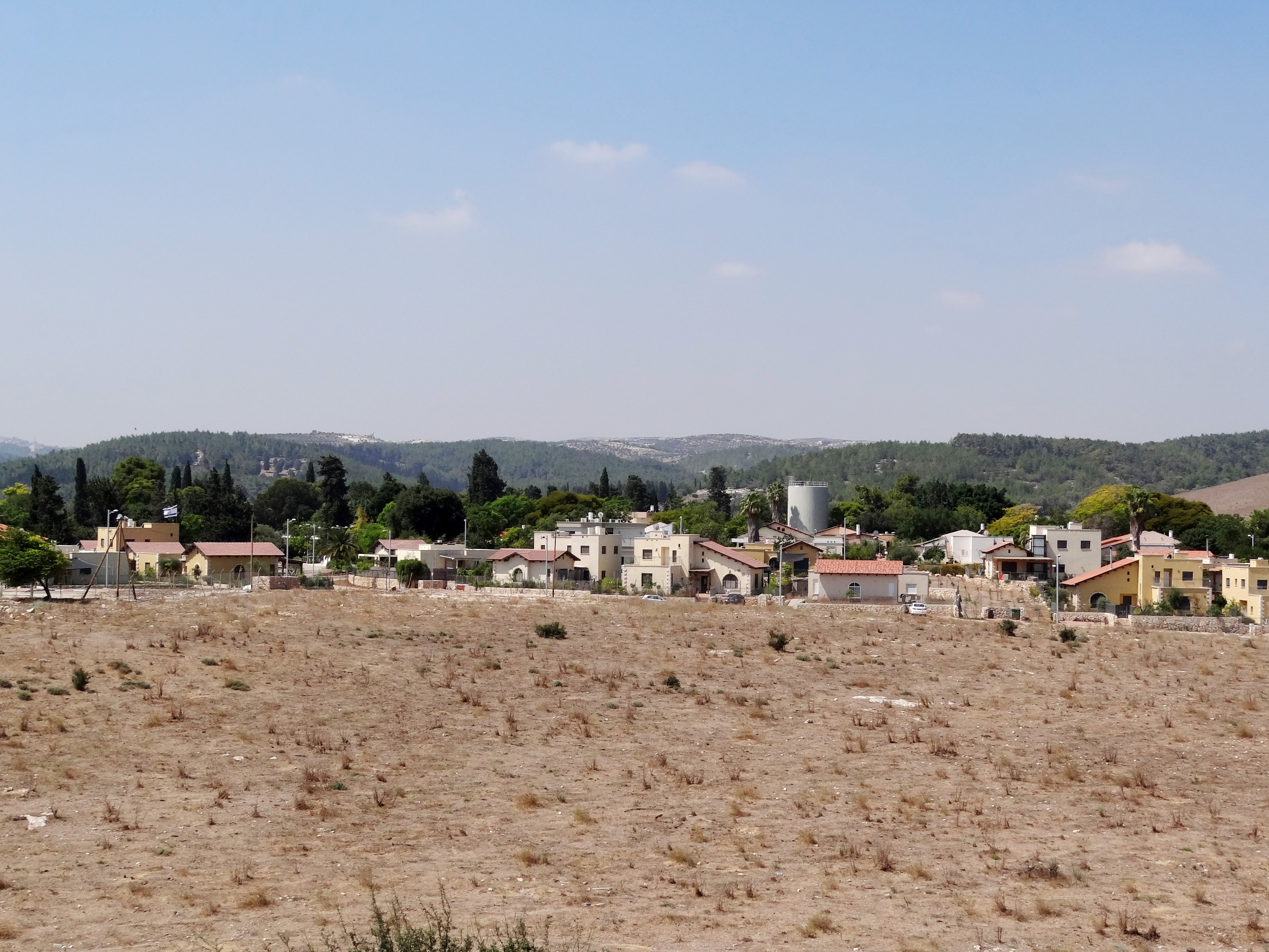 מגידו הוא קיבוץ בעמק יזרעאל ובמועצה אזורית מגידו, המשתייך לתנועת הקיבוץ הארצי. הקיבוץ שוכן ליד תל מגידו. צולם מהתל